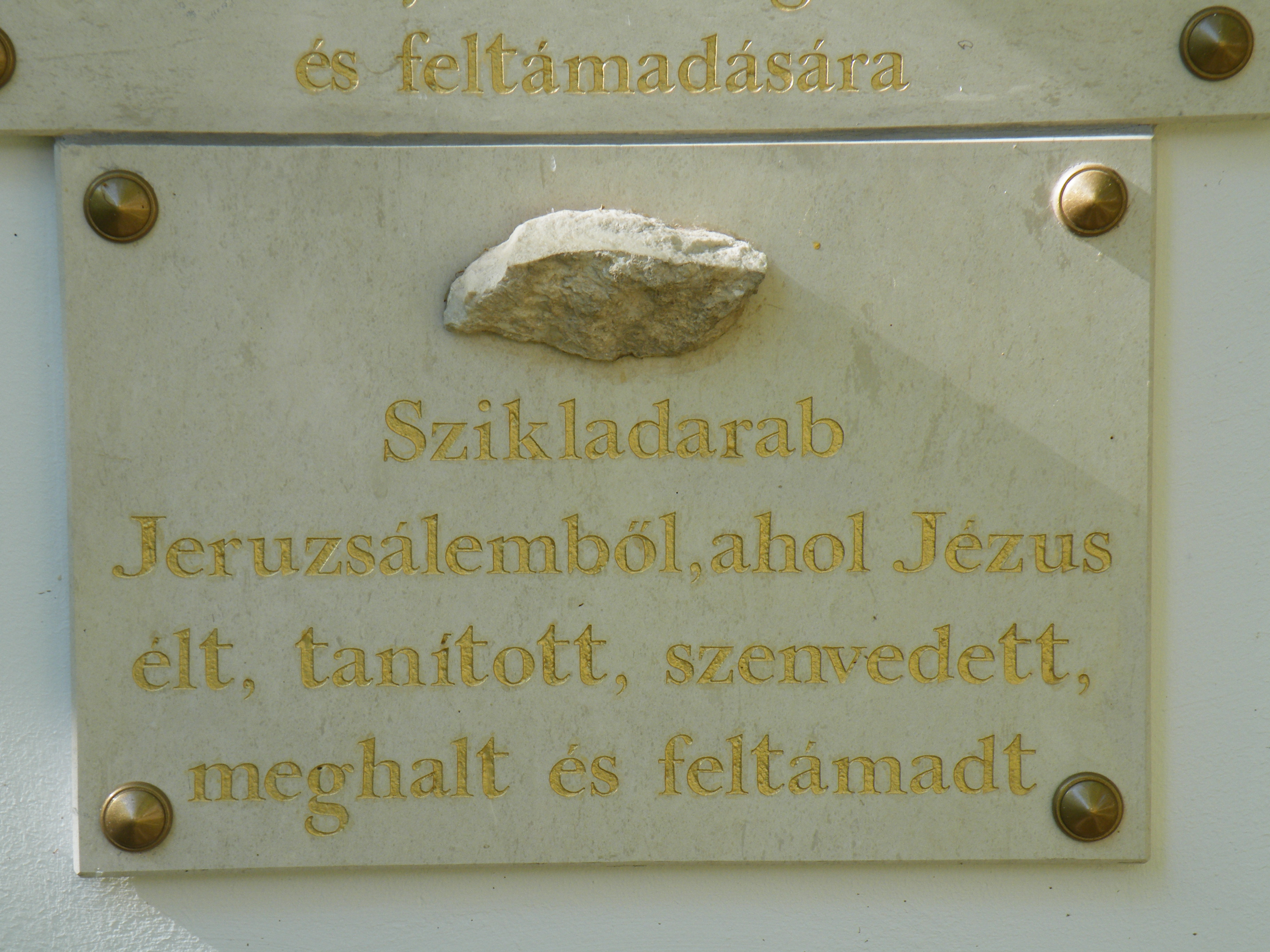 Stációk a Palóc ligetben, Balassagyarmaton